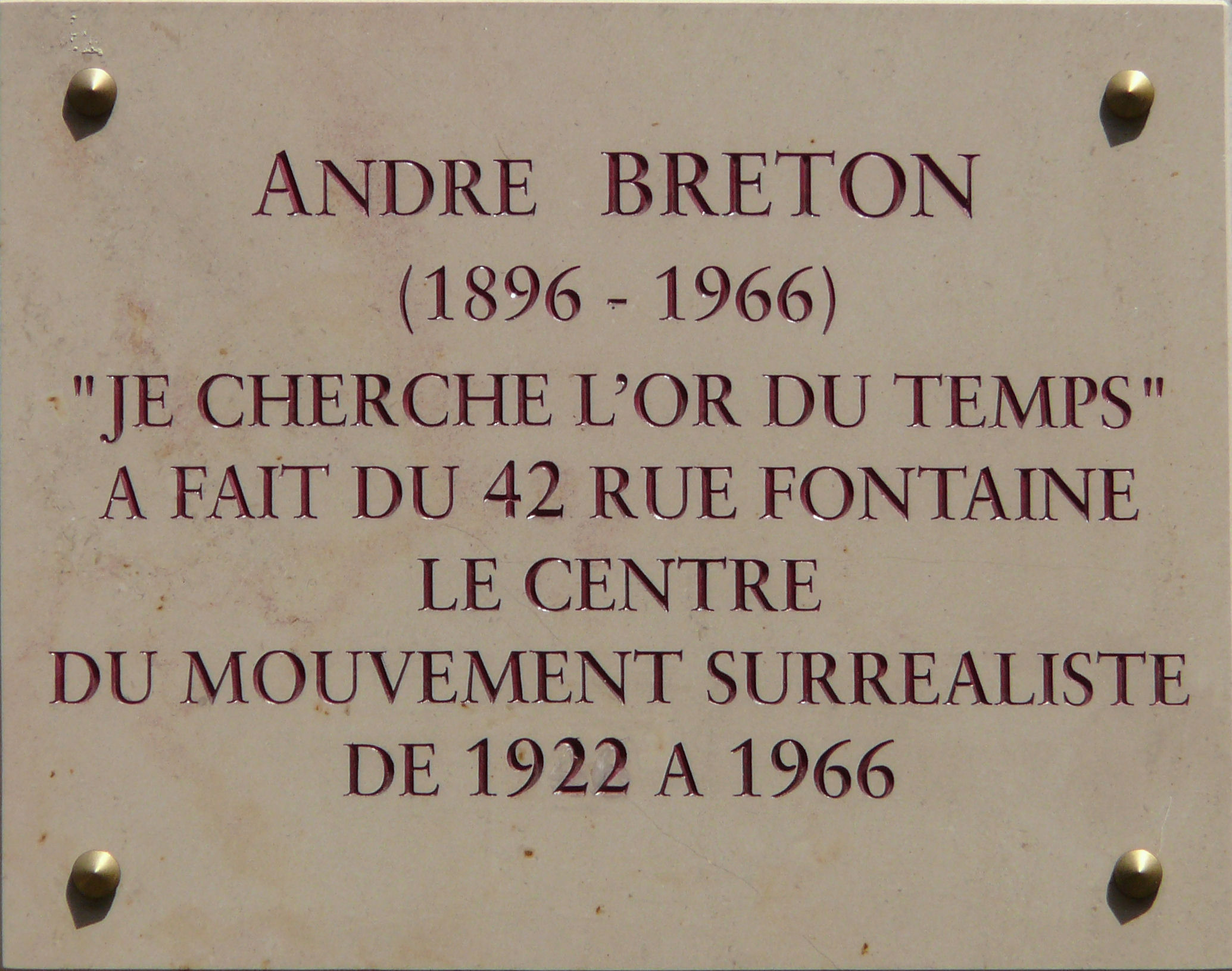 Paris 9ème arrondissement - Comédie de Paris - Plaque commémorative